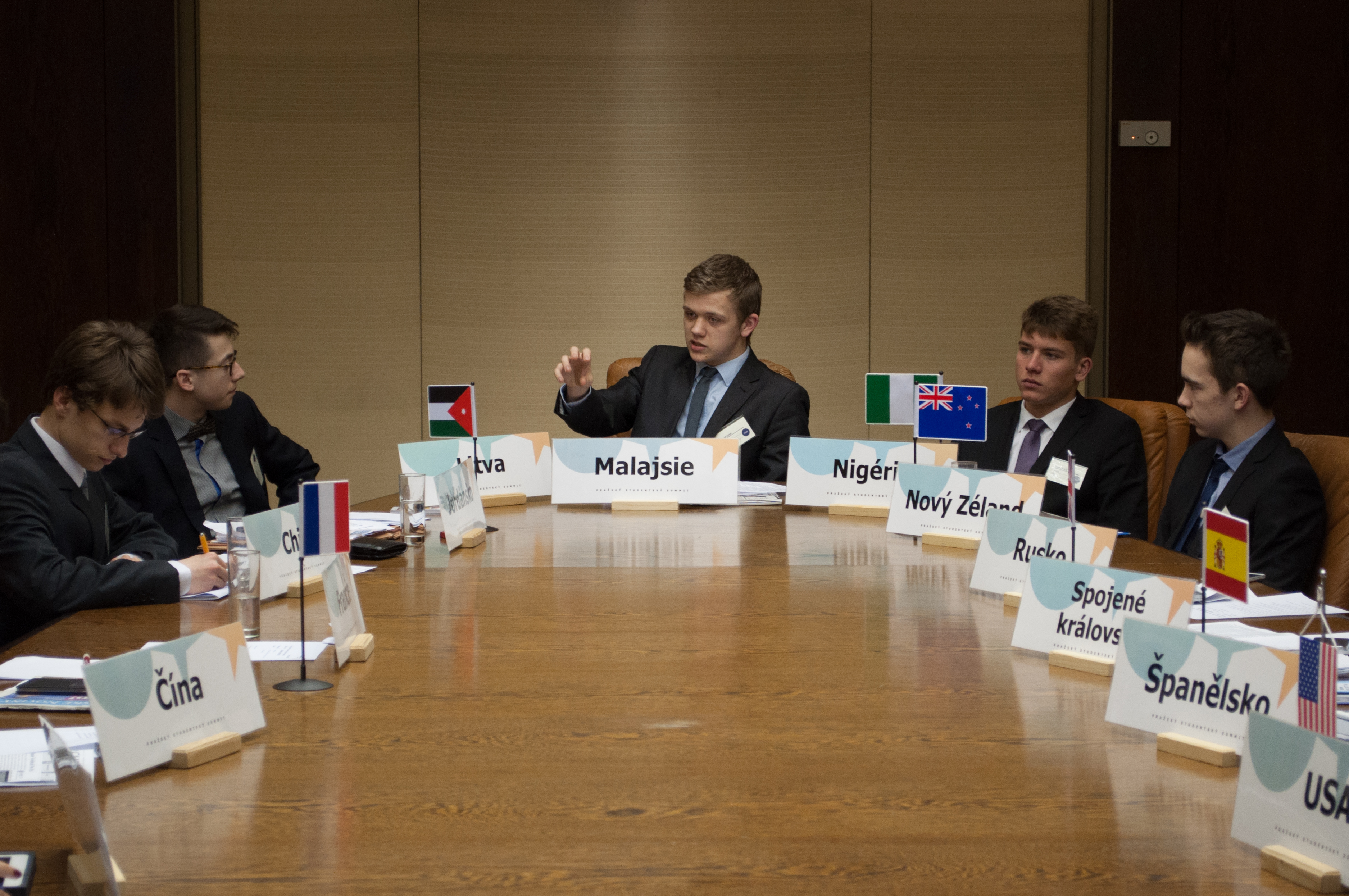 UNSC